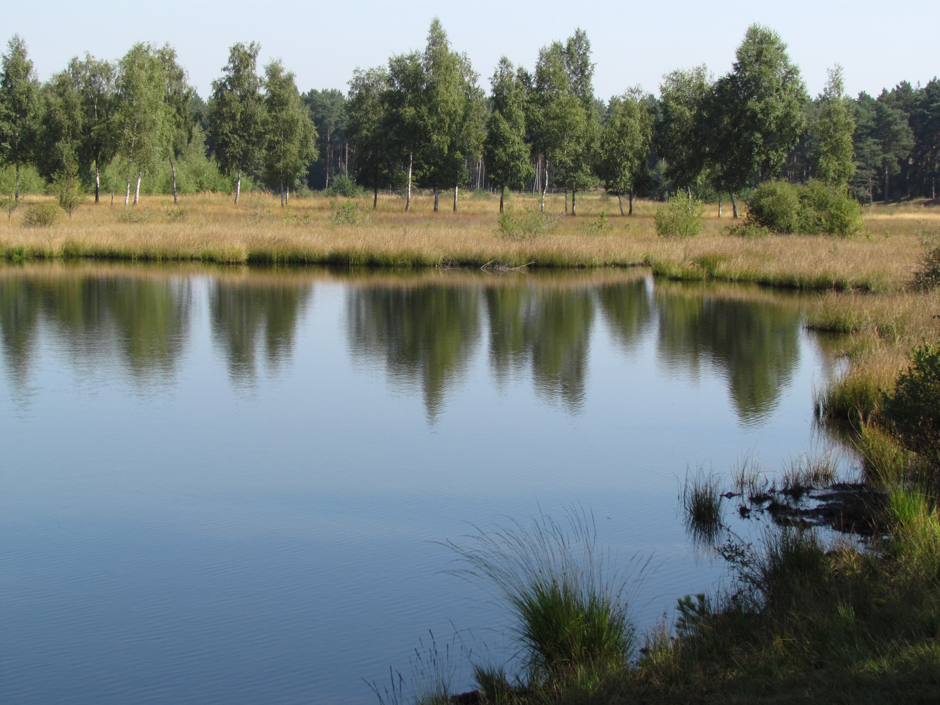 Teverener Heide, Heidesee, NSG HS-001